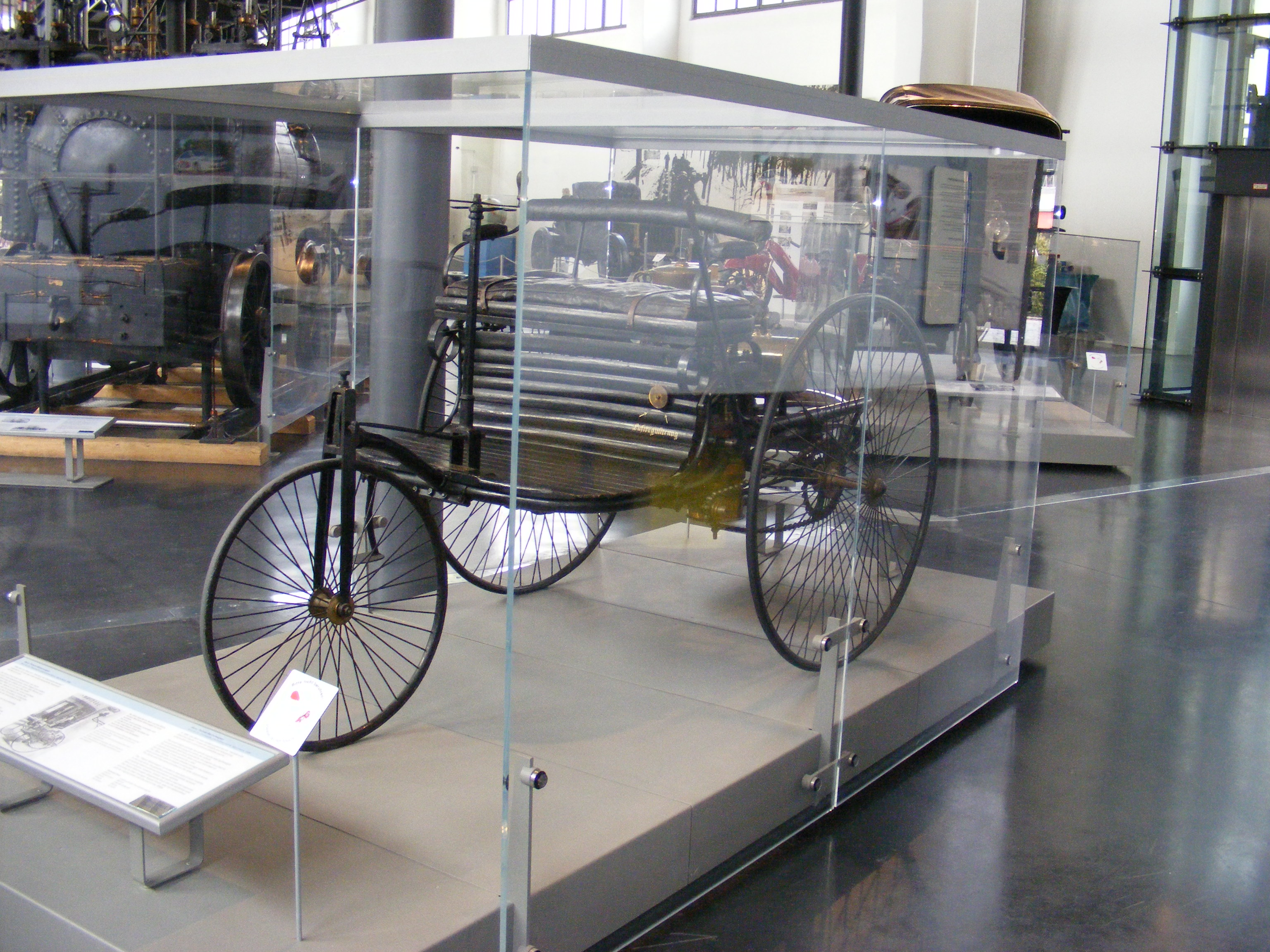 Benz Patent-Motorwagen Nummer 1, Bj. 1903 (größtenteils mit Originalteilen von 1886) — Exponat im Deutschen Museum Verkehrszentrum München, seit 1906 im Deutschen Museum ausgestellt. Versicherungssumme 16 Mio. EUR (lt. Museumsführer).